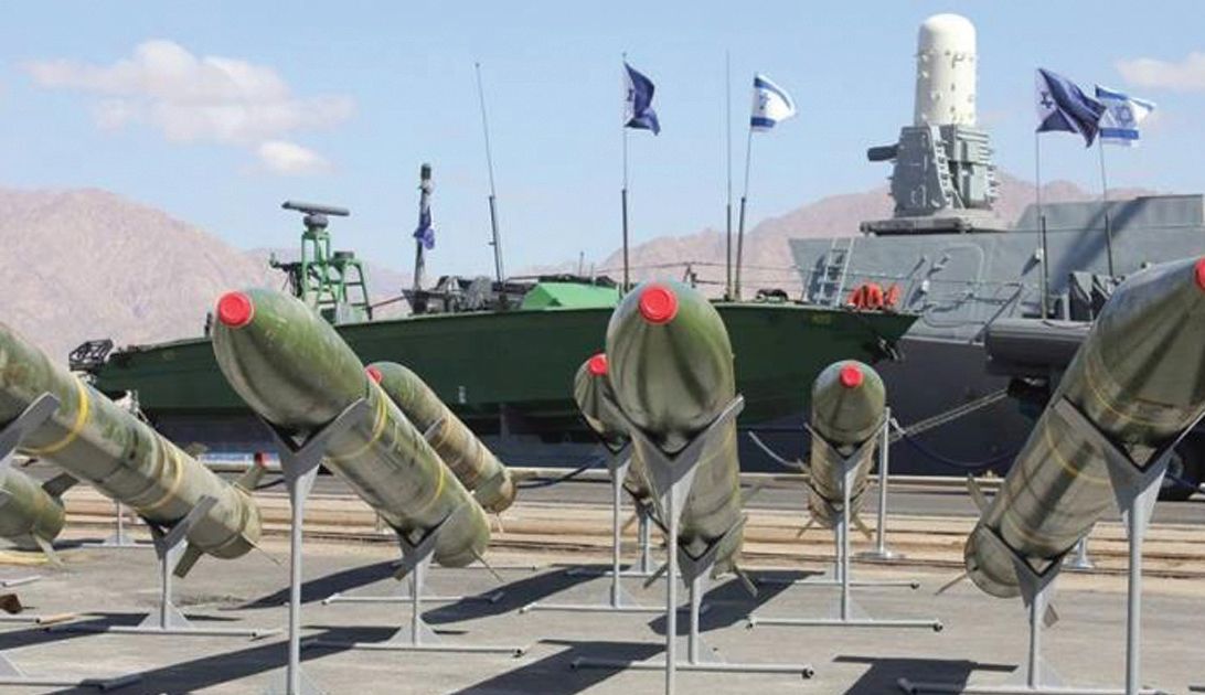 רקטות מסוג מ-304 שהובלו באניית הנשק קלוז סי